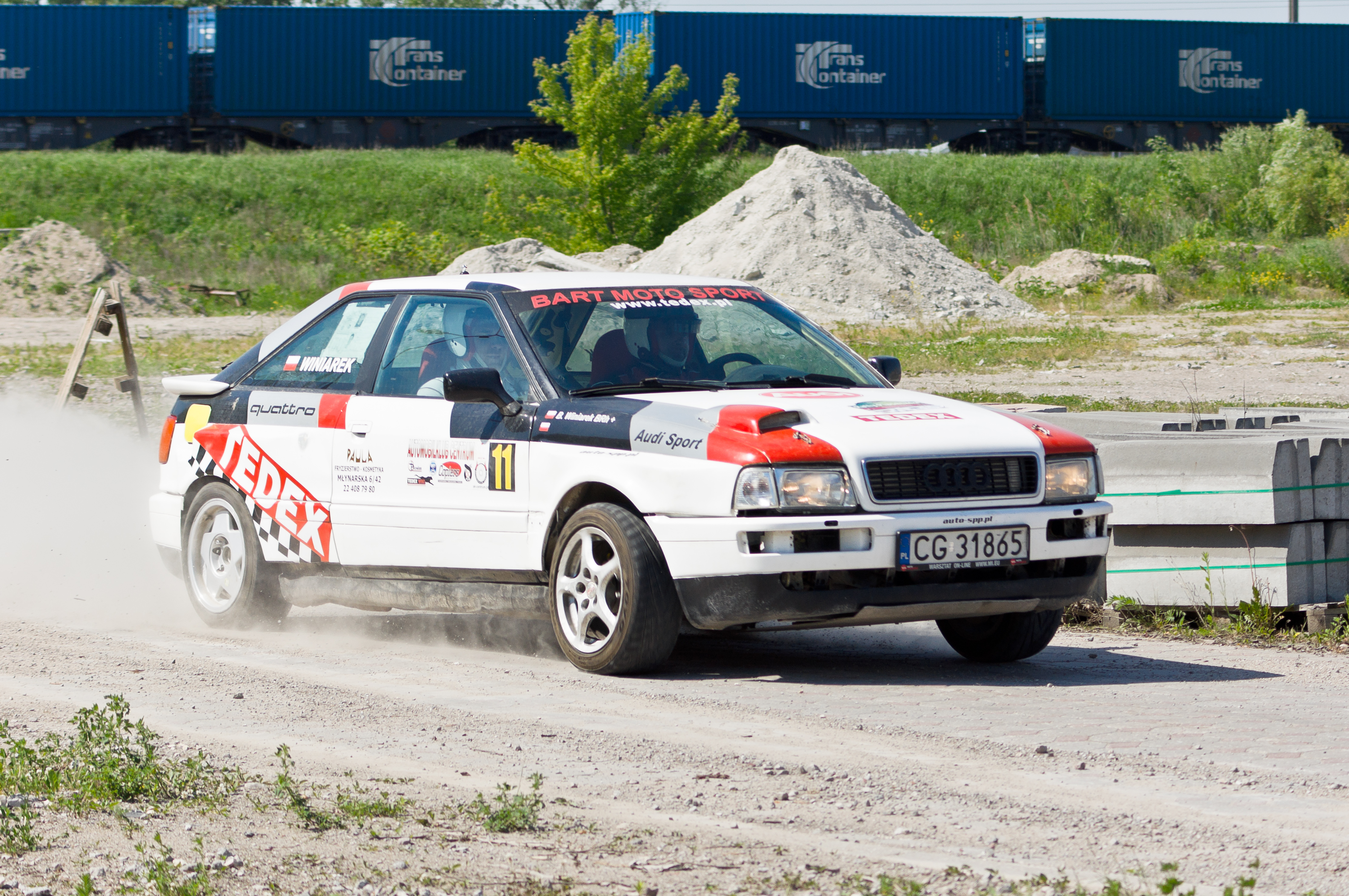 Wyścig VII Rally Piaseczno 2012, OS Gąski, Audi S2 quattro, nr startowy 11, kierowca Bartosz Winiarek, pilot Przemysław Salamon.